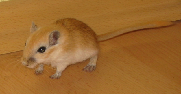 Meriones unguiculatus